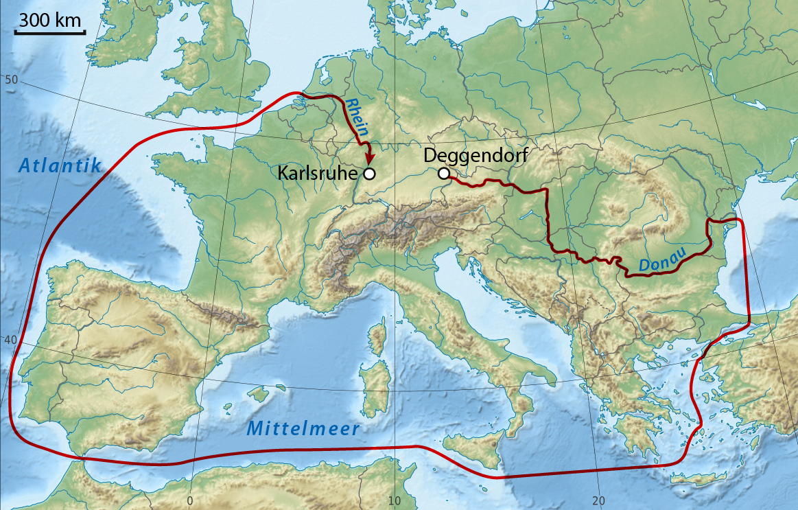 Karte des Transportwegs von KATRIN